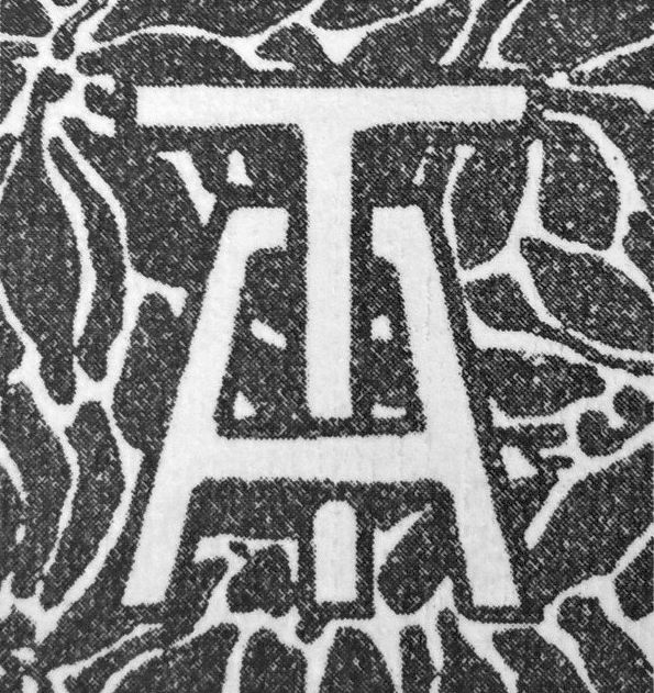 Sigla Tinerimii artistice din anul 1926